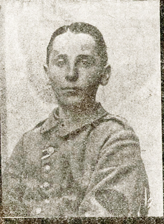 Karl Heintz, Saalstadt, Pfalz, Inhaber der Bayerischen Tapferkeitsmedaille